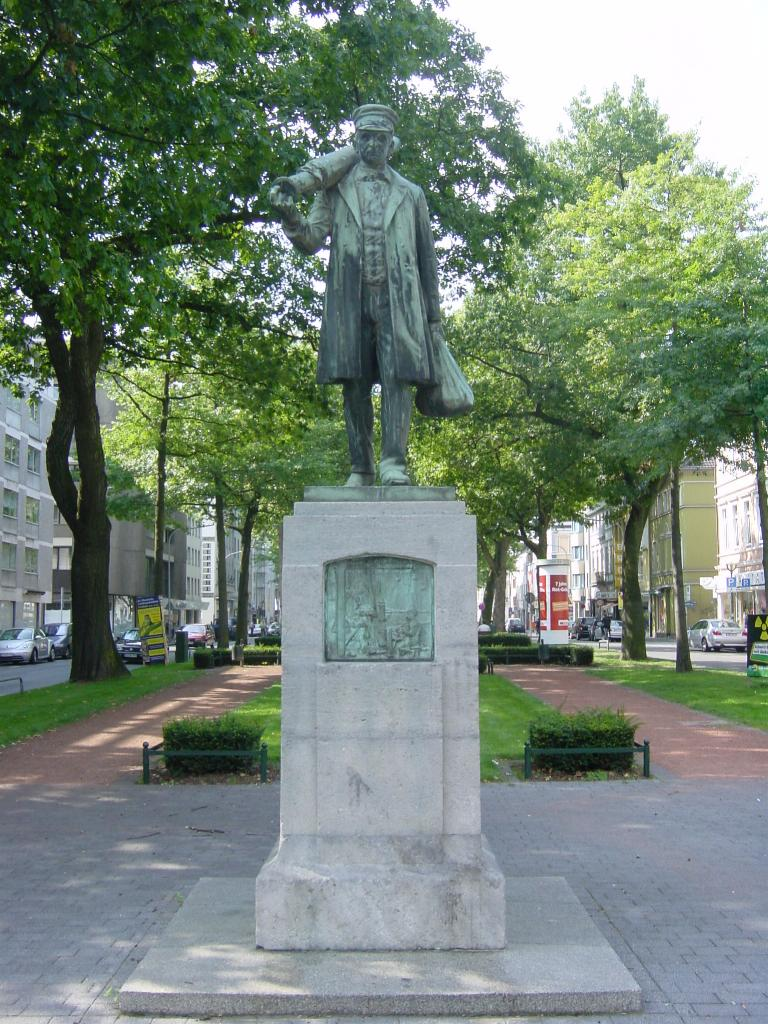 Bildbeschreibung: Meister Ponzelar, Krefeld Quelle: selbst fotografiert Fotograf/Zeichner: DER UNFASSBARE